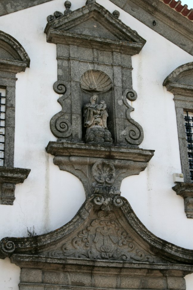 Mesão Frio - Frontaria da Igreja de Santa Cristina